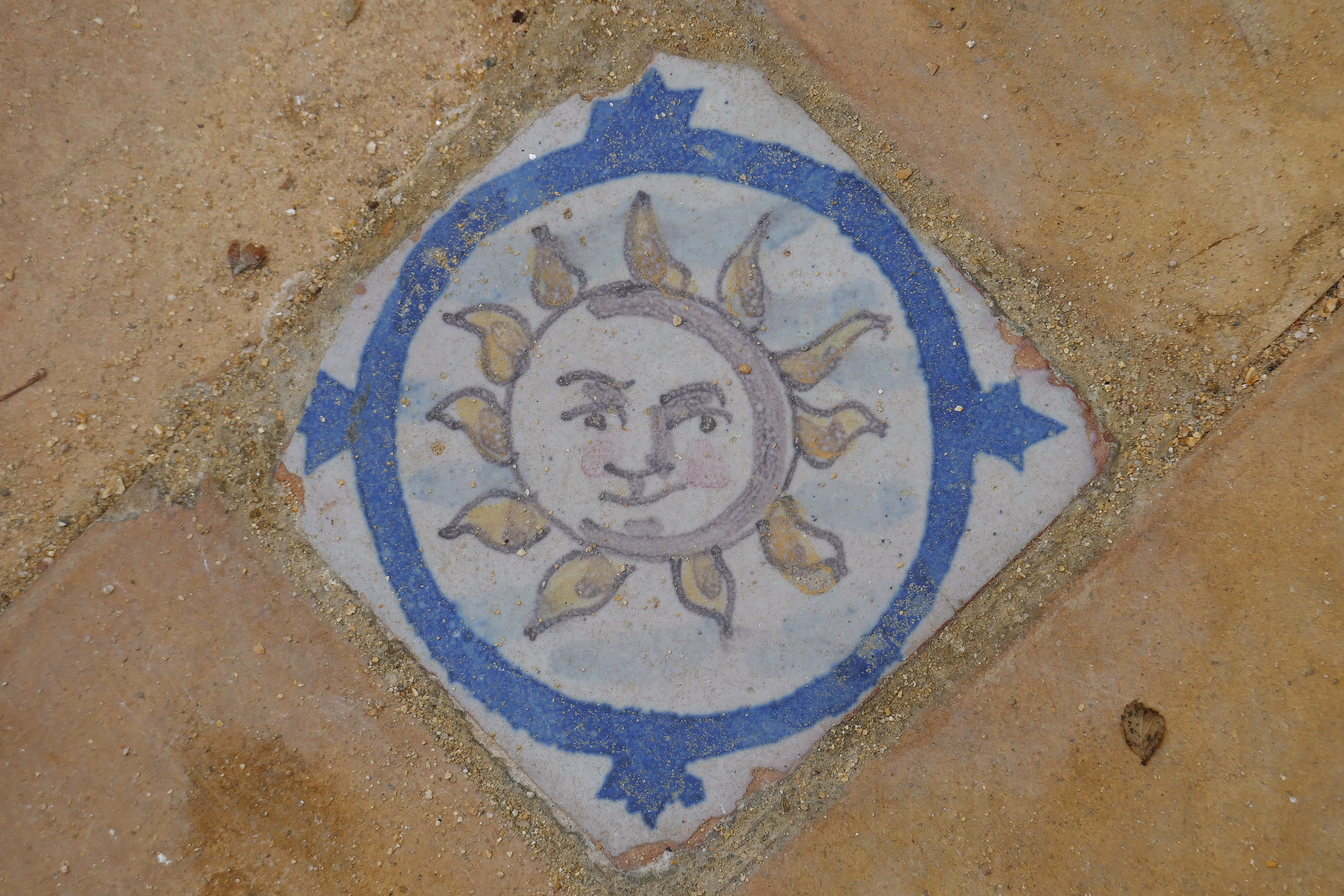 Bodenfliese im Casa de Pilatos in Sevilla, Spanien